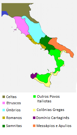 Mapa que mostra a localização dos Samnitas e outros povos itálicos pré-romanos.